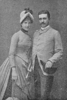 Павел и Фанни Синебрюховы